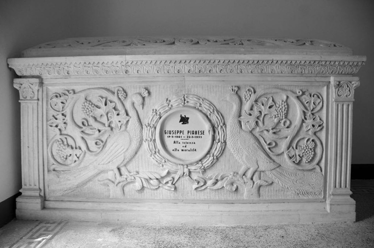 Immagine fotografata dall'album di famiglia che ne ha autorizzato l'uso.